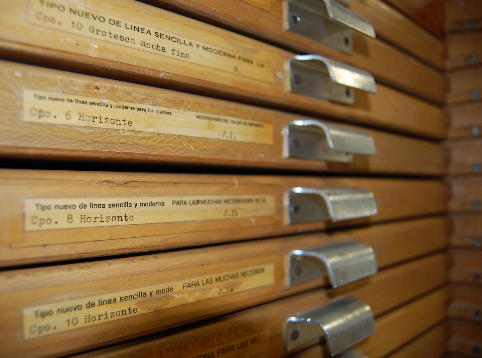 Moble destinat a guardar tipus de plom